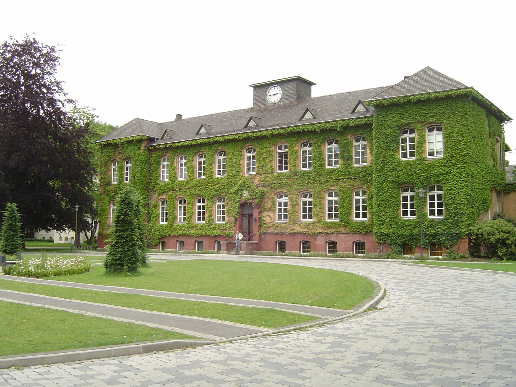 Verwaltungsgebäude der Westfälischen Klinik Dortmund